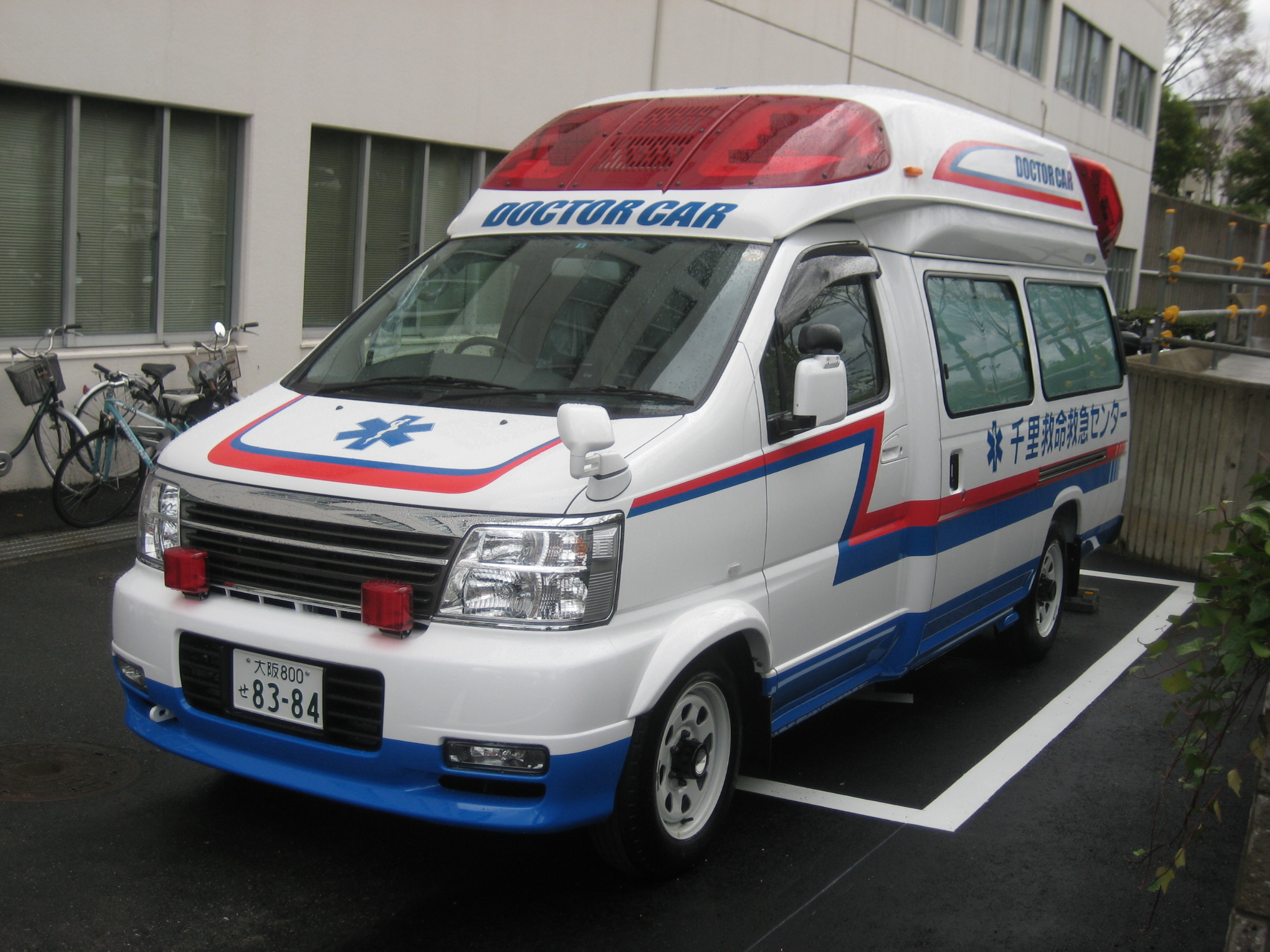 千里救命救急センター4代目ドクターカー